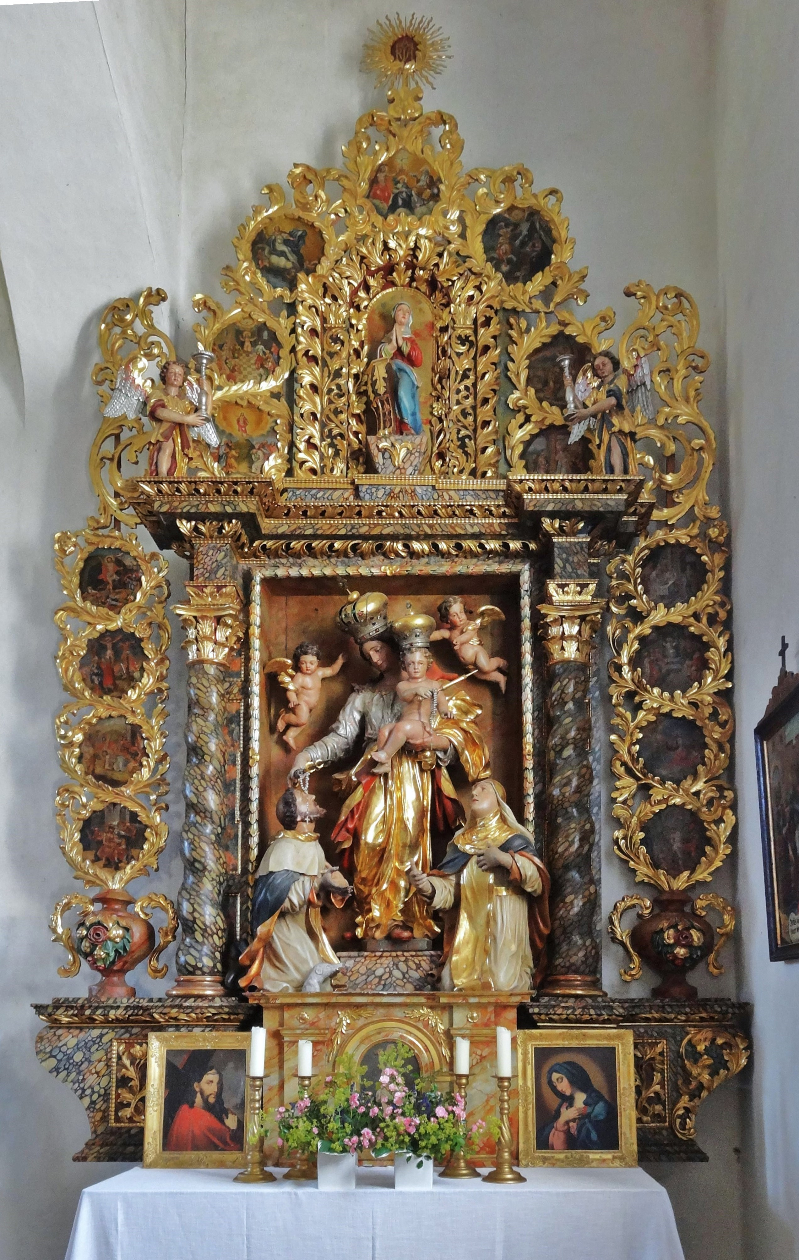 Kath. Pfarrkirche hl. Jakobus der Ältere (Deutsch Griffen), der Rosenkranzaltar